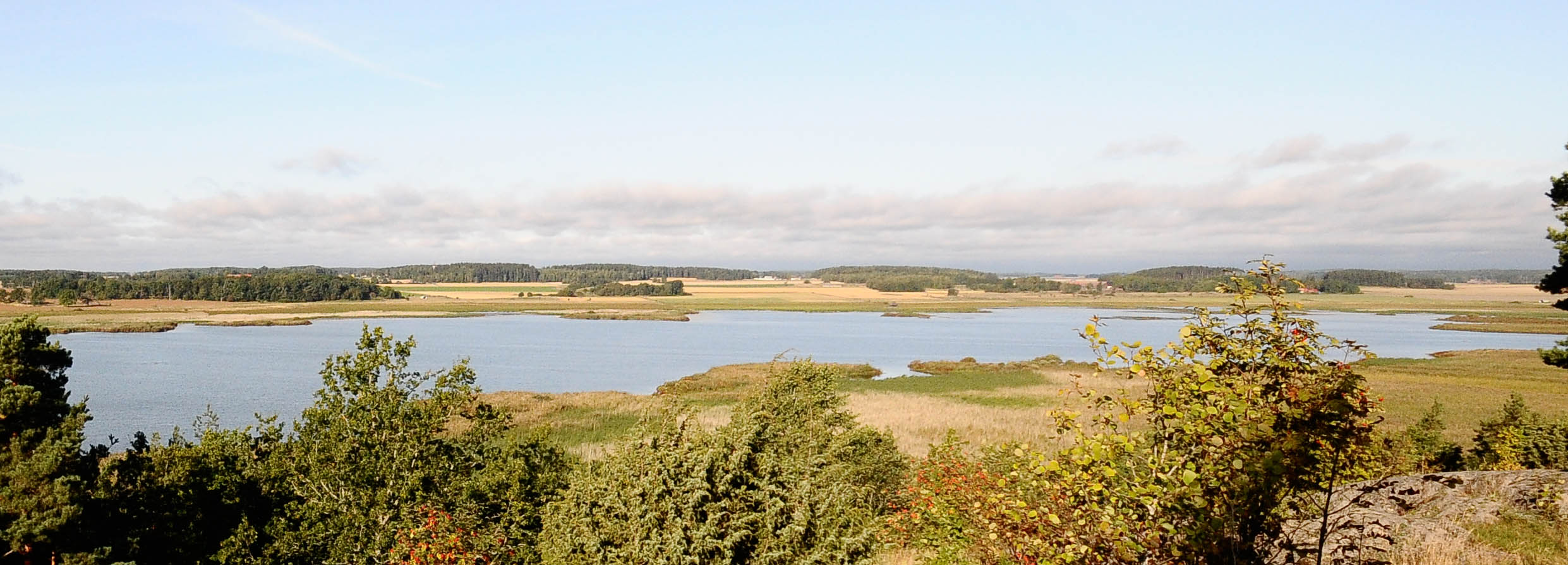 Hjälstaviken seen from Kvarnberget, Uppland, Sweden.